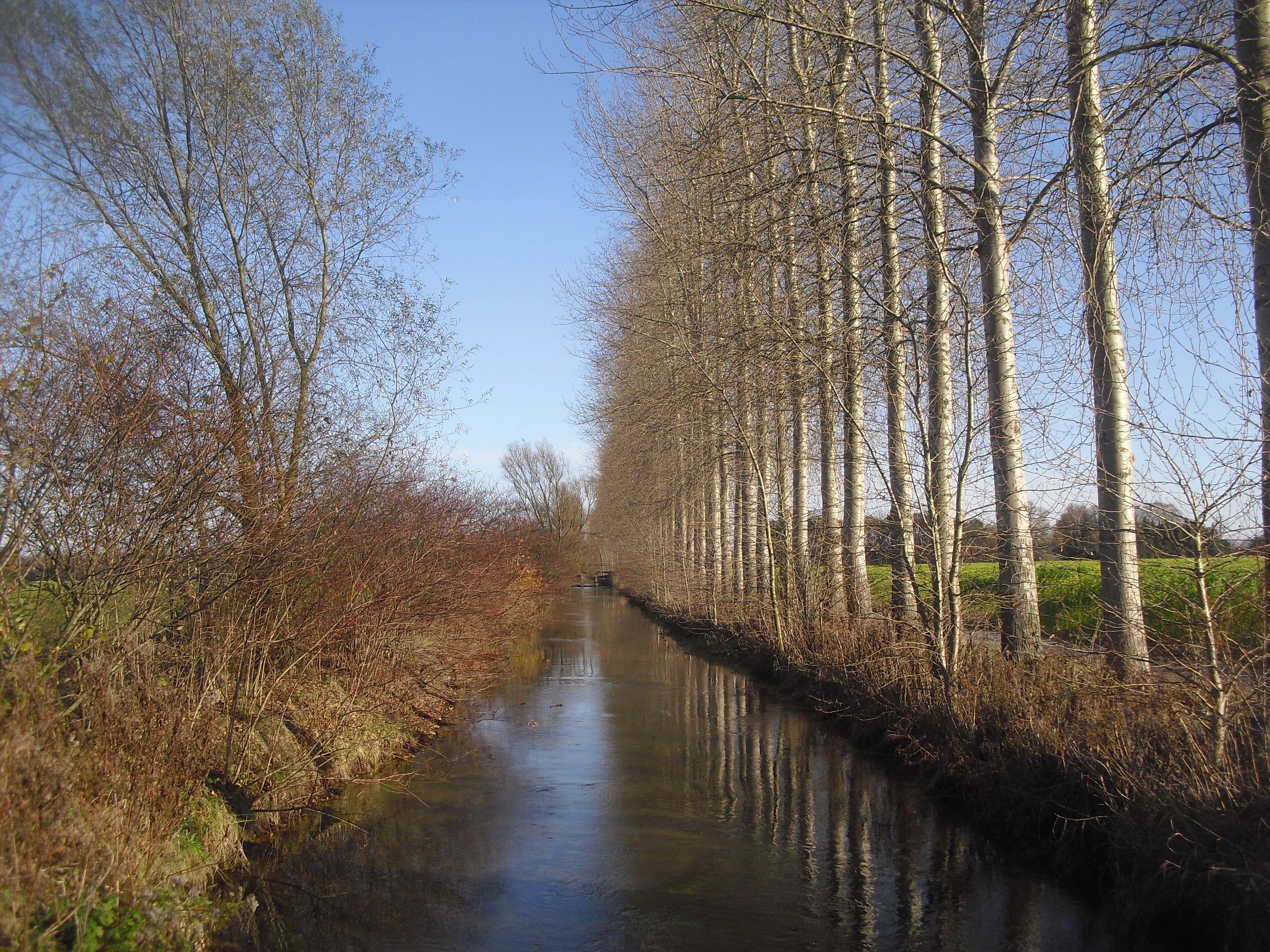 Boker-Heide-Kanal nördlich von Heddinghausen